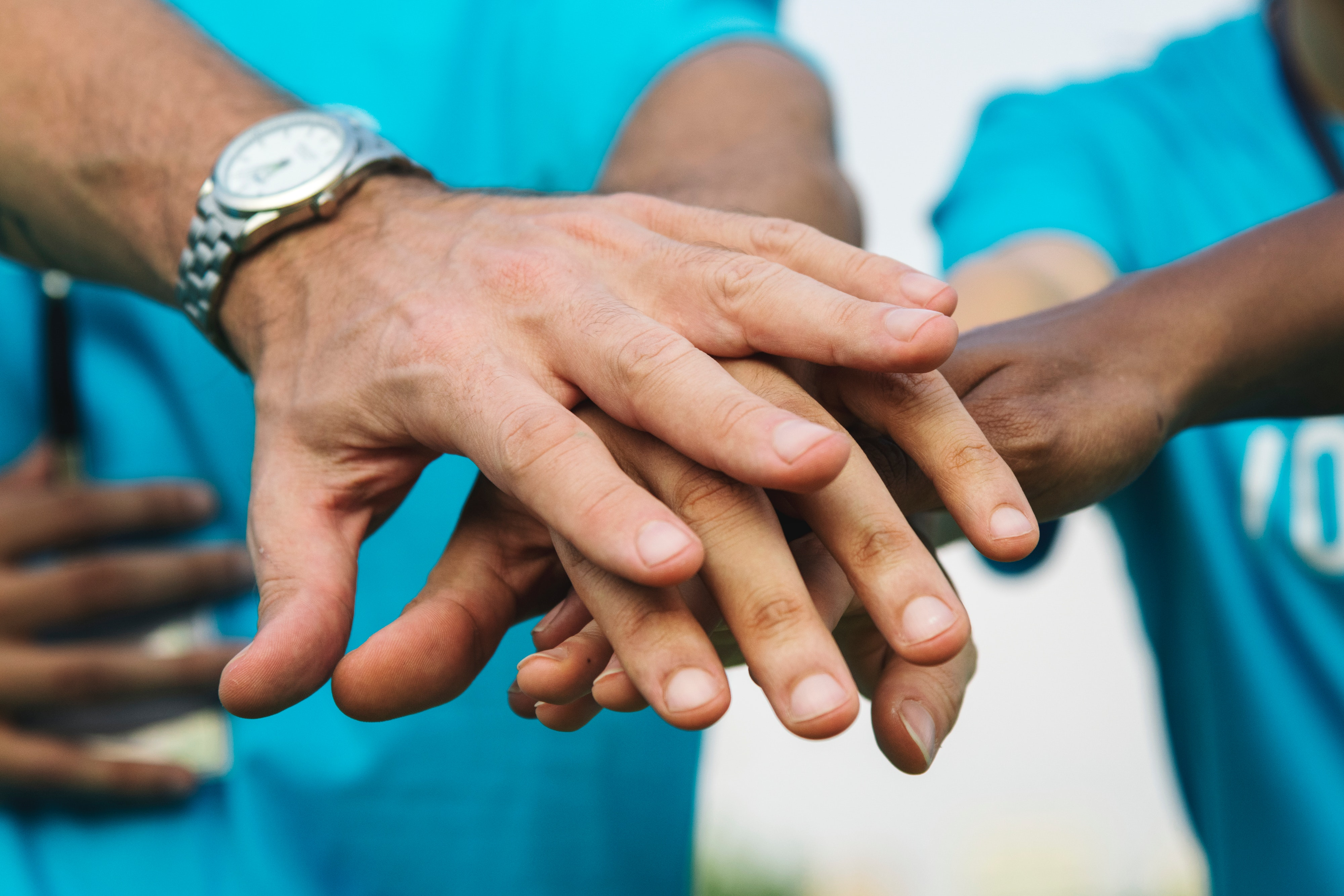 Acció afirmativa